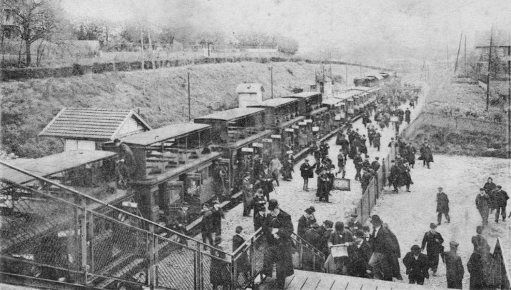 Arrivée d'un train, sans doute dans la halte du Val d'Or (avant la création de la gare) un jour de courses à l'hippodrome de Saint-Cloud. Photo prise depuis le haut de la passerelle.